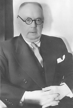 Vuorineuvos Yrjö Pulkkinen.